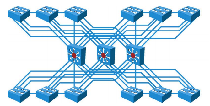 Монгол: цэөбыбөа